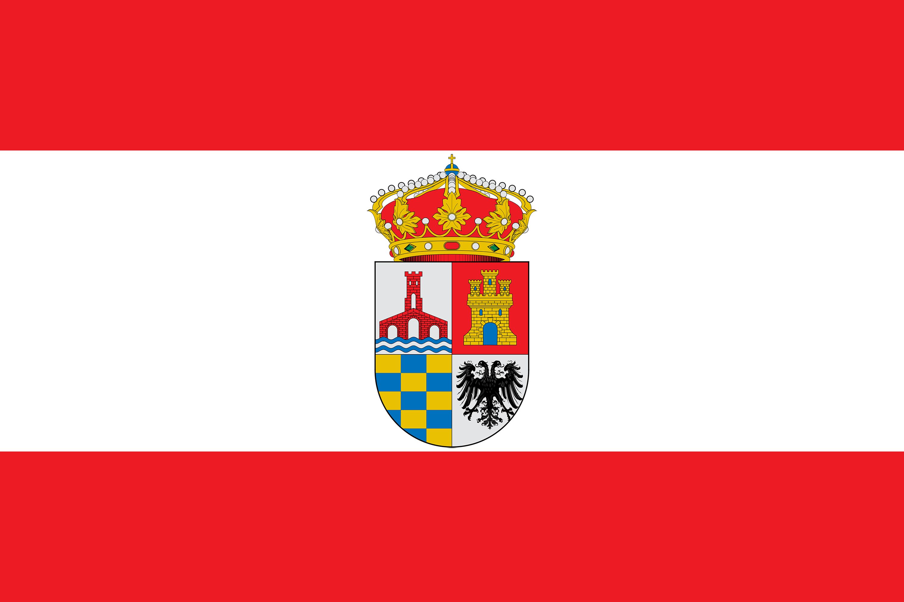 Bandera de Medellín (Badajoz). «Bandera rectangular, de proporciones 2/3: tres franjas horizontales, la central blanca y del tamaño doble que las otras dos, que son de color rojo, con el escudo municipal brochante al centro y en sus colores».